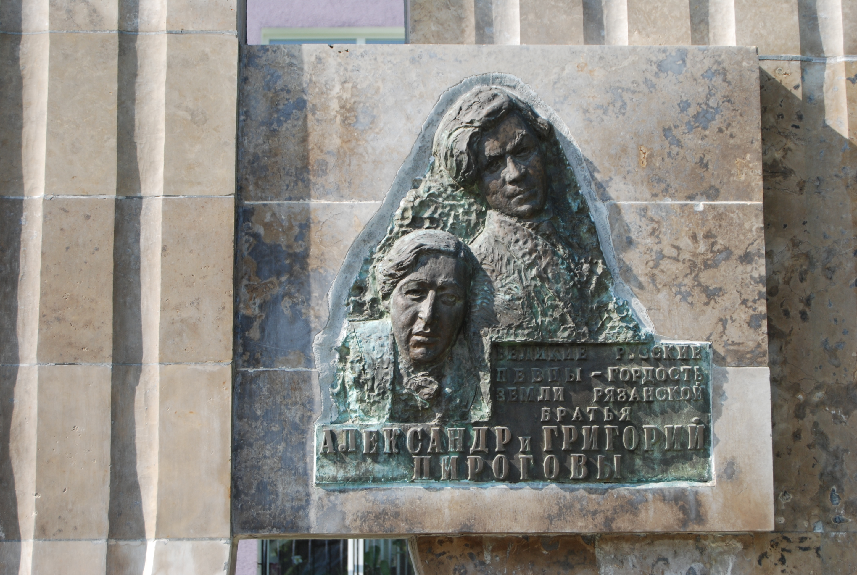 Памятник Александру и Григорию Пироговым, установленный возле Рязанского музыкального училища. Адрес: Рязань, Дзержинского 42 Место